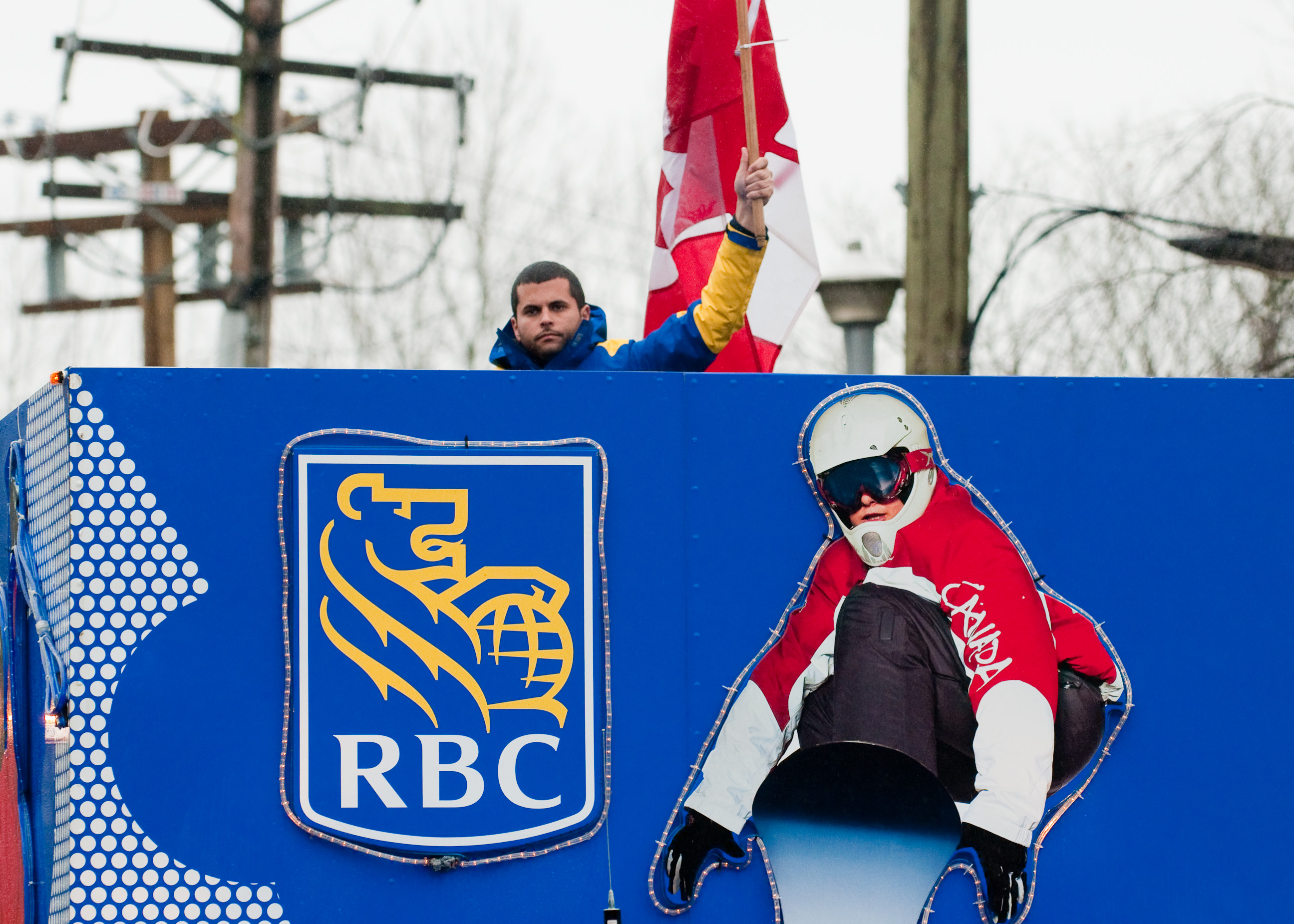 Proud Sponsor